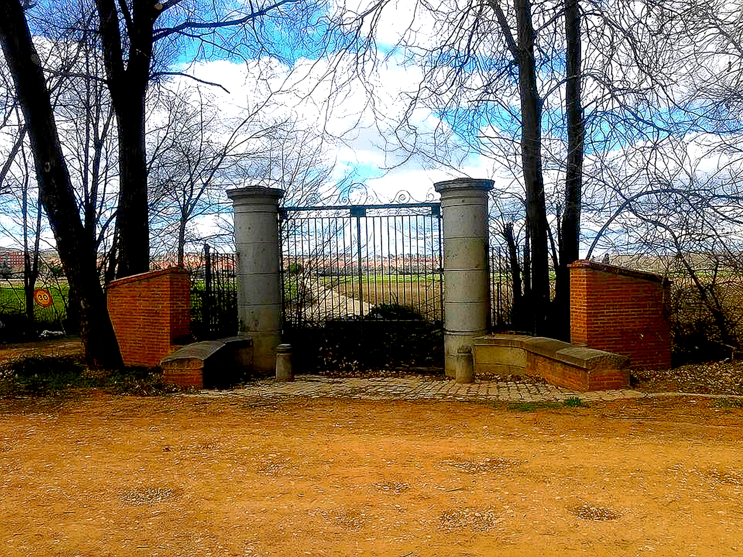 Puerta de La Reina, paseo de Los Plátanos (antiguo de El Cardón) en la Huerta Grande del Real Sitio de San Fernando.